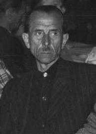 Zentralbild-Köhler Kno-Be. 7.5.52 Arbeitstagung des Deutschen Schriftstellerverbandes über das Kinder- und Jugendbuch. Am 7. Mai 1952 fand im Klub der Kulturschaffenden in Berlin eine Tagung des Deutschen Schriftstellerverbandes statt. Thema der Tagung war das Kinder- und Jugendbuch. Stalinfriedenspreisträgerin Anna Seghers leitete die Arbeitstagung ein, auf der 200 Schriftsteller aus der DDR anwesend waren. UBz: Teilnehmer an der Tagung. V.l.n.r.: die Schriftsteller Karl Veken aus Berlin, Erich Müller aus Berlin und Admuth Miethke aus Kemberg Kreis Wittenberg.